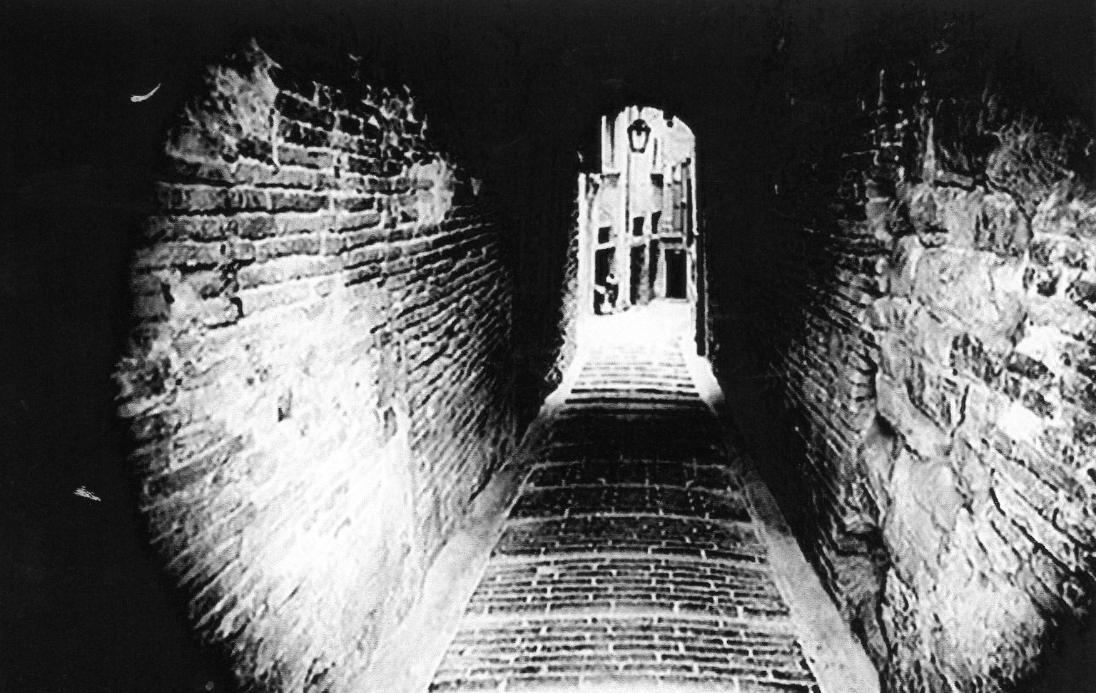 vicolo medievale coperto di Perugia (vicolo della Spina)